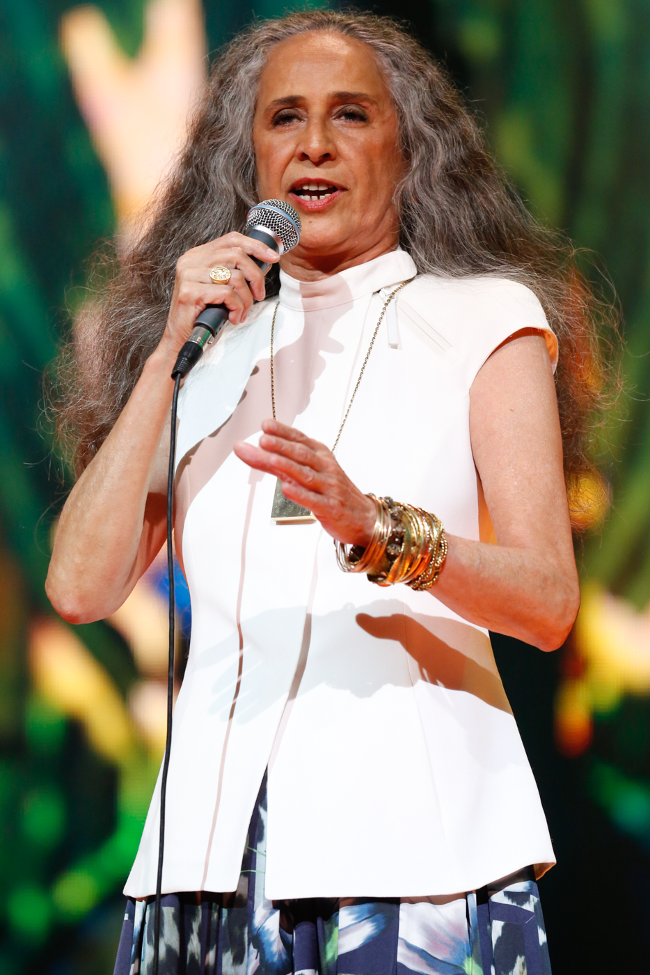 Maria Bethania durante o 25o Premio da Musica Brasileira no Theatro Municipal. Foto: Roberto Filho (14/05/14)